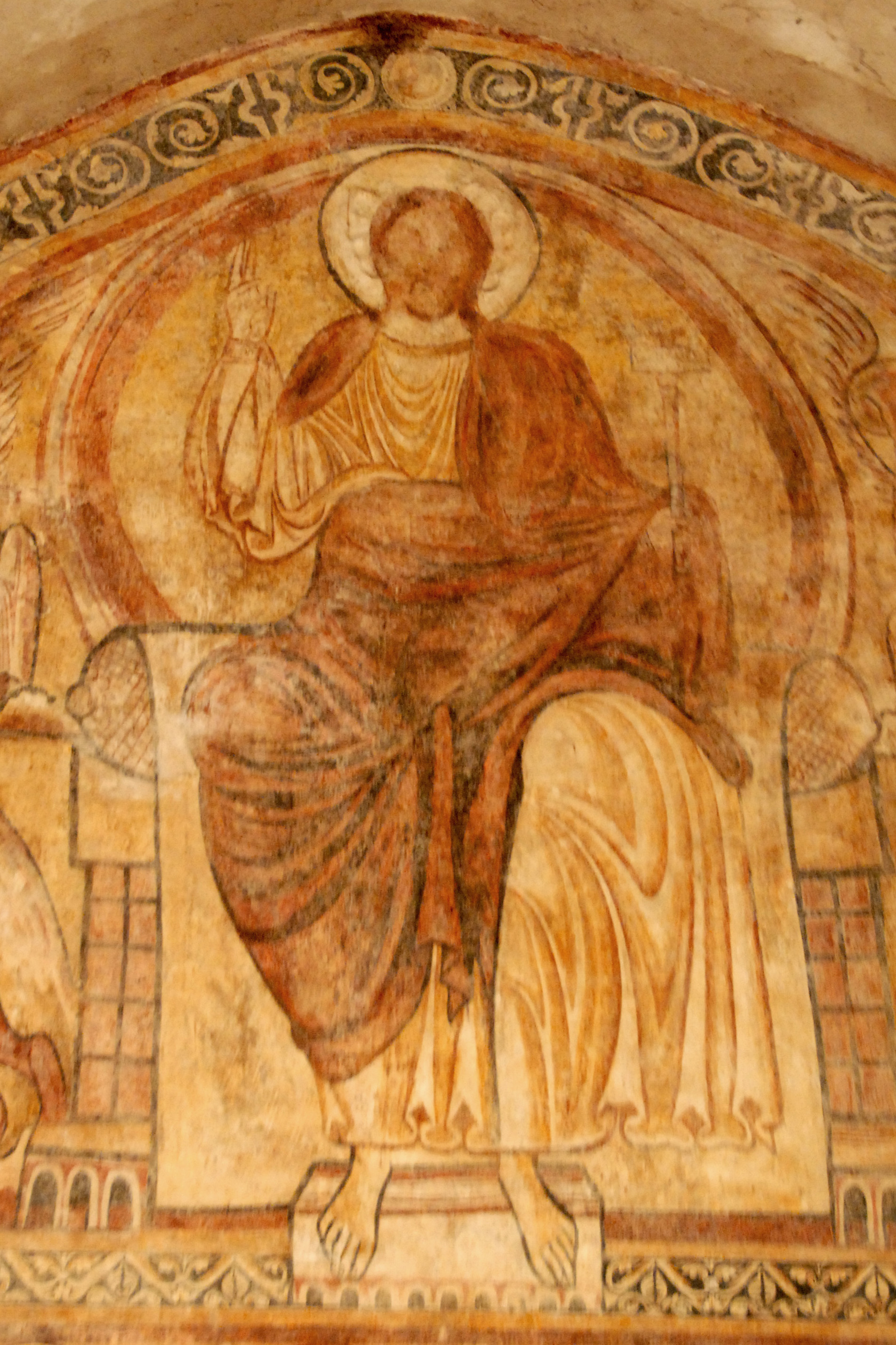 Abtei St.-André Lavaudieu, Refektorium, Fresko, thronender Christus